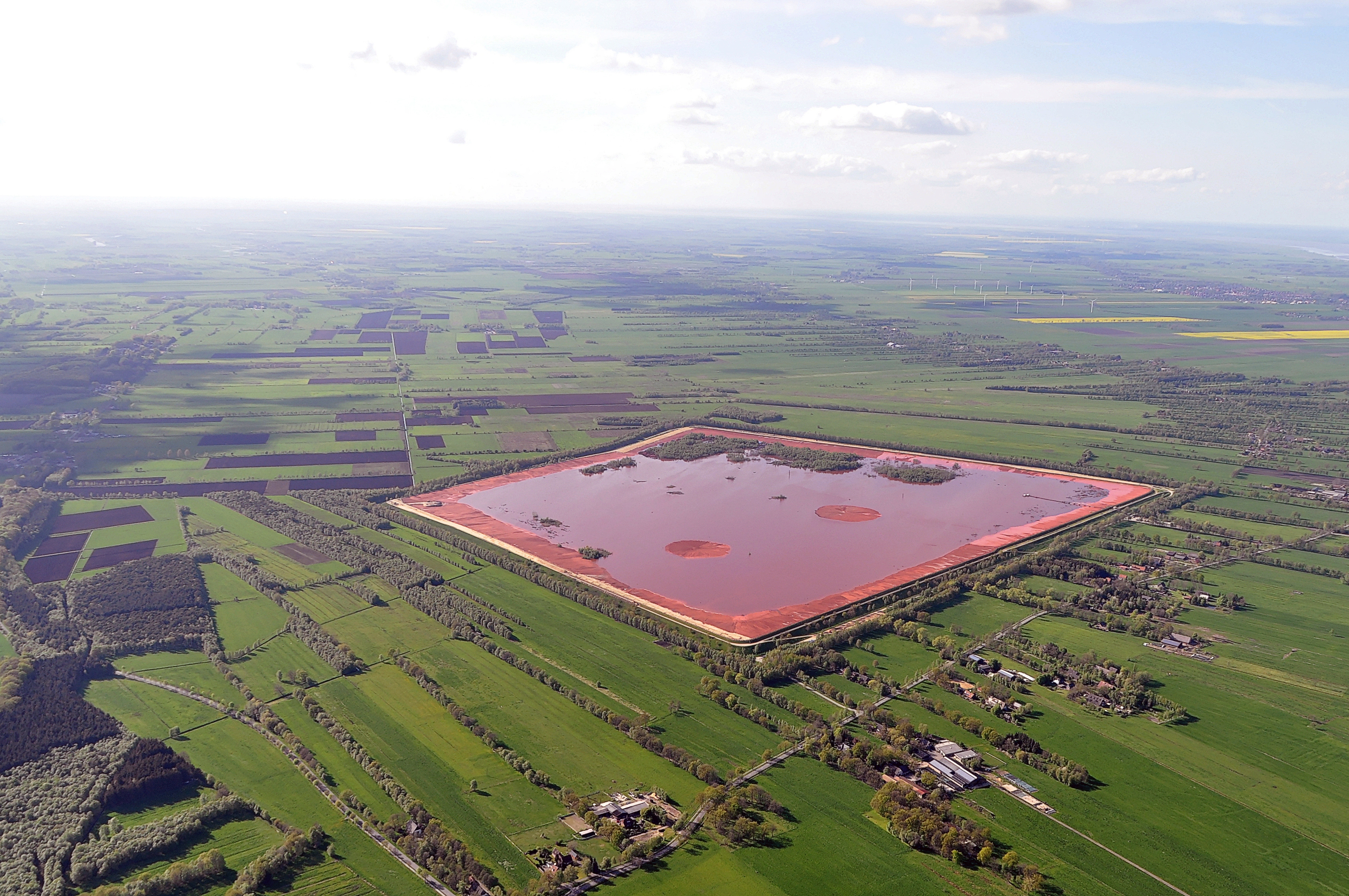 Luftbilder von der Nordseeküste 2012-05